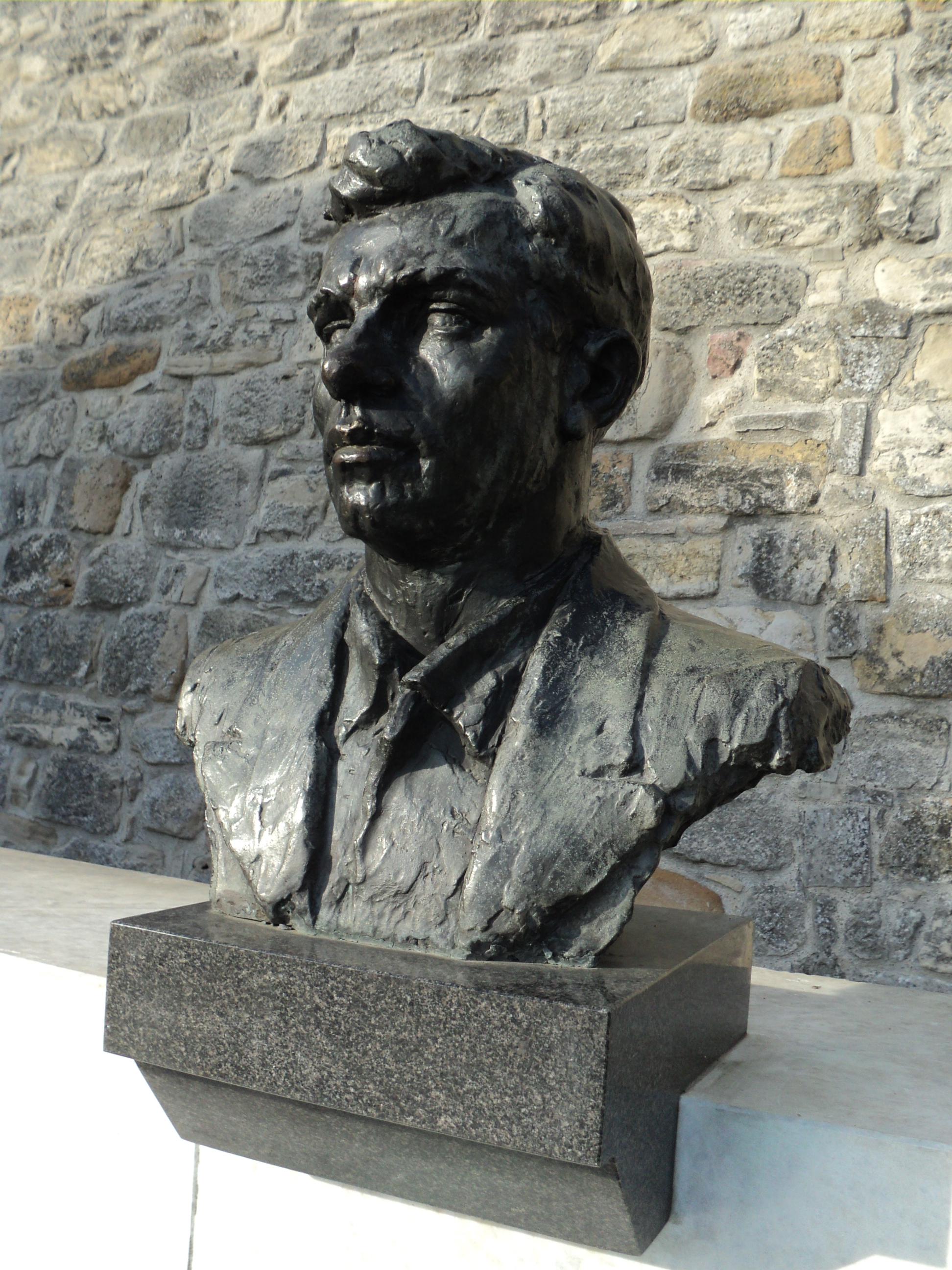 Buste de Đuro Đaković, Tombeau des Héros nationaux de Kalemegdan